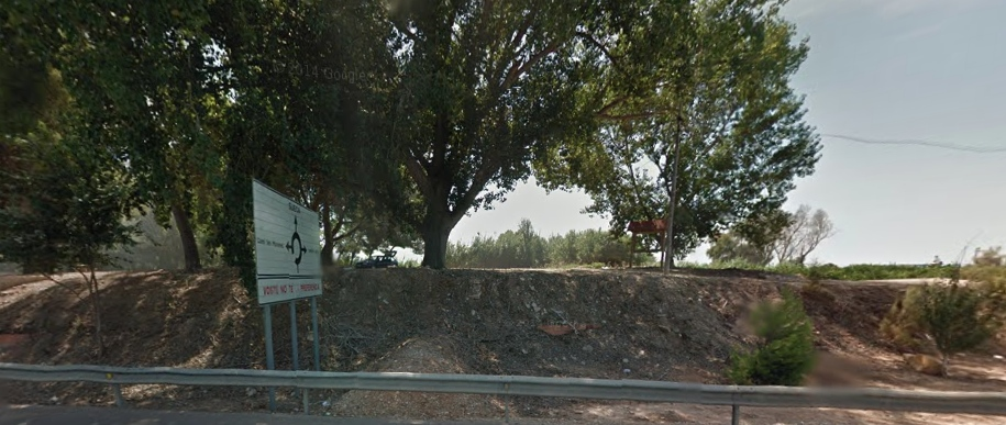 Mota del riu Xúquer al seu pas per Albalat